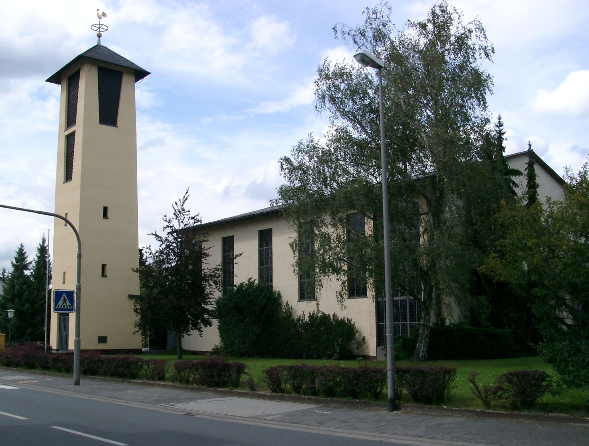 Evangelische Christuskirche in Dreieich Sprendlingen